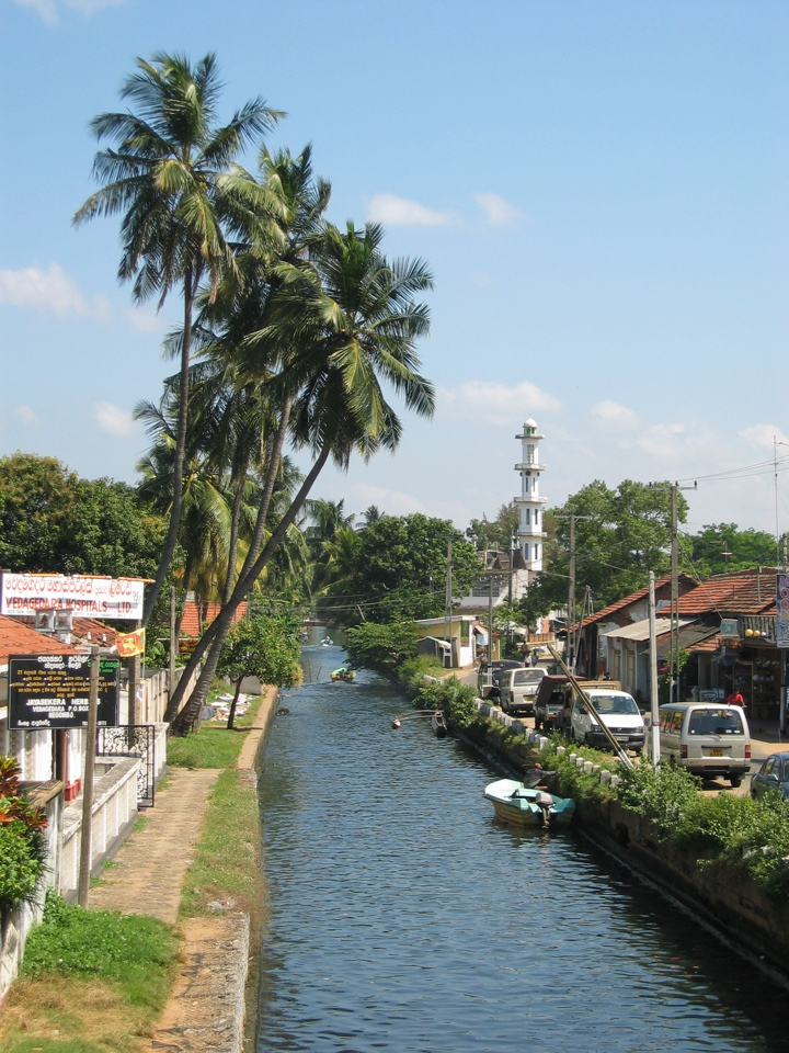 Sri Lanka, Negombo, dutch canal